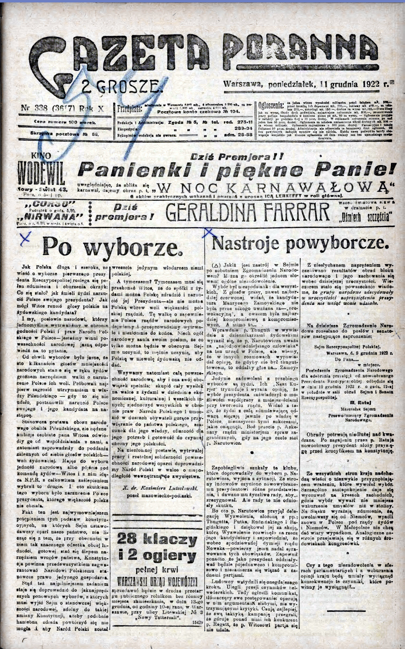 „Gazeta Poranna 2 Grosze” z 11 grudnia 1922 – strona tytułowa z tekstem Kazimierza Lutosławskiego obwieszczającym zdradę narodową po wyborze Gabriela Narutowicza na prezydenta RP